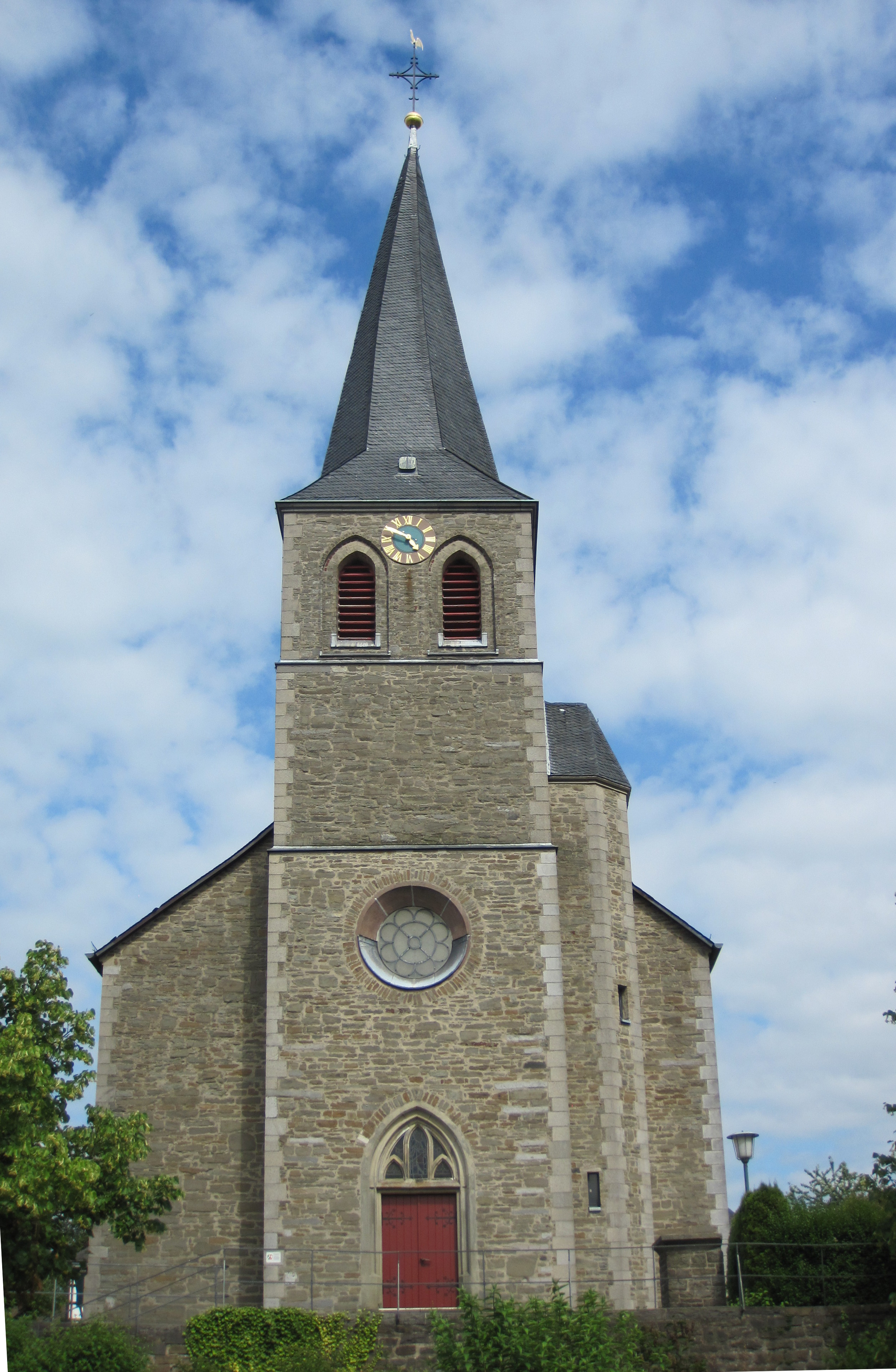 Birk Sankt Mariä Geburt